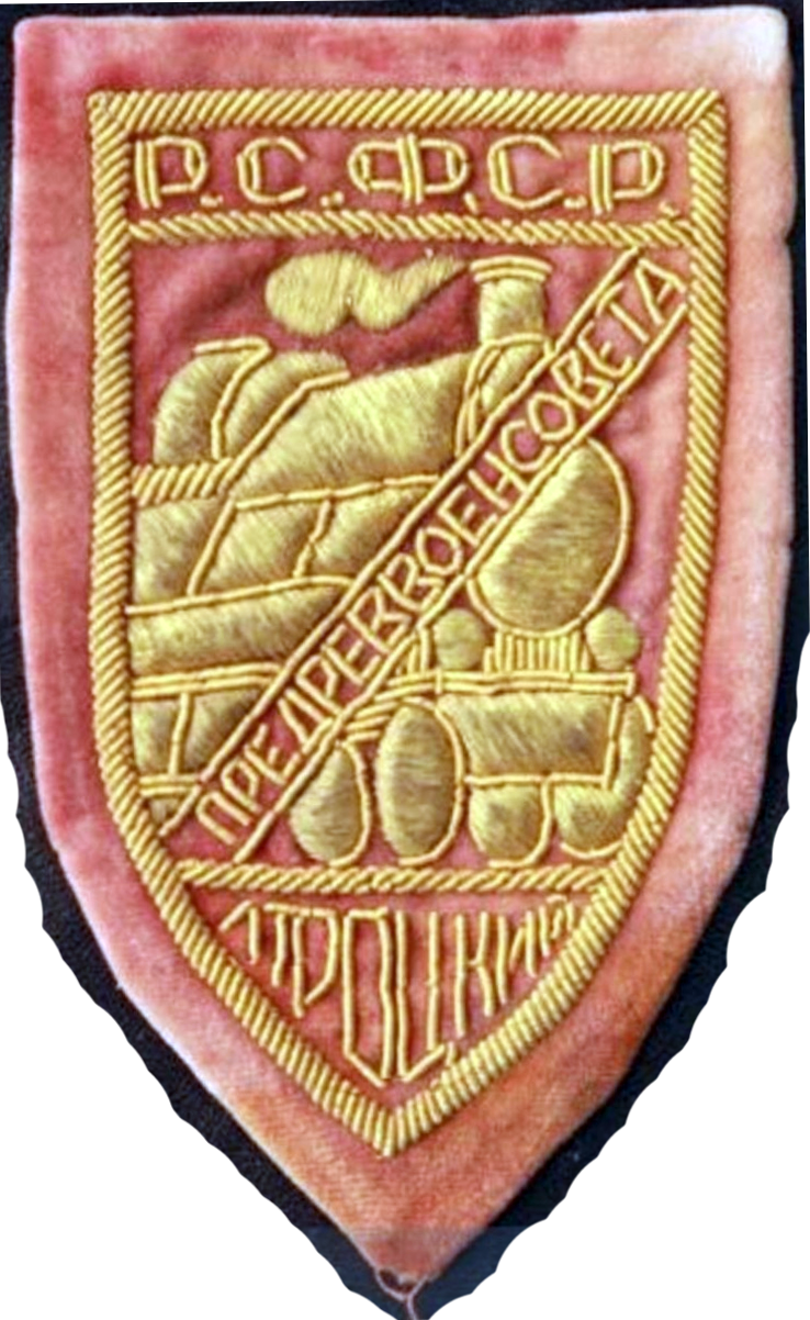 Шеврон стрелков бронепоезда Троцкого (1918-1920)